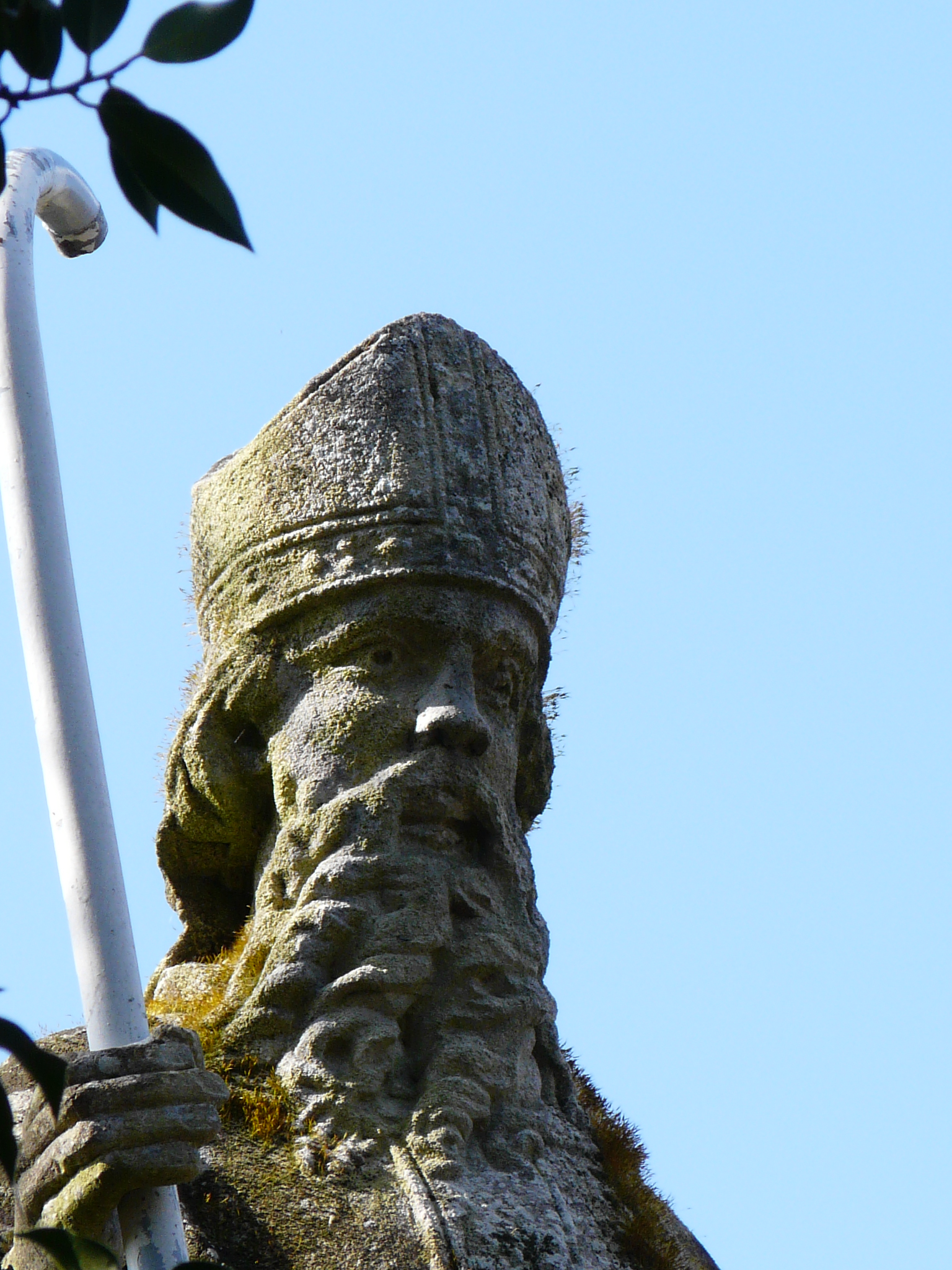 Statue de St clair dominant la fontaine du même nom